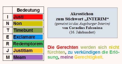 Graphik zu Cornelius Falconissas lateinischem Akrostichon (1548) mit deutscher Übersetzung